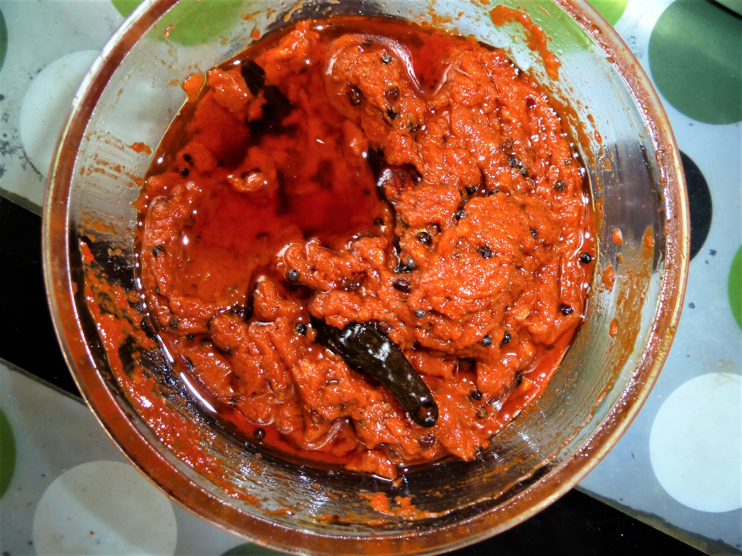 మామిడికాయ కోరు పచ్చడి